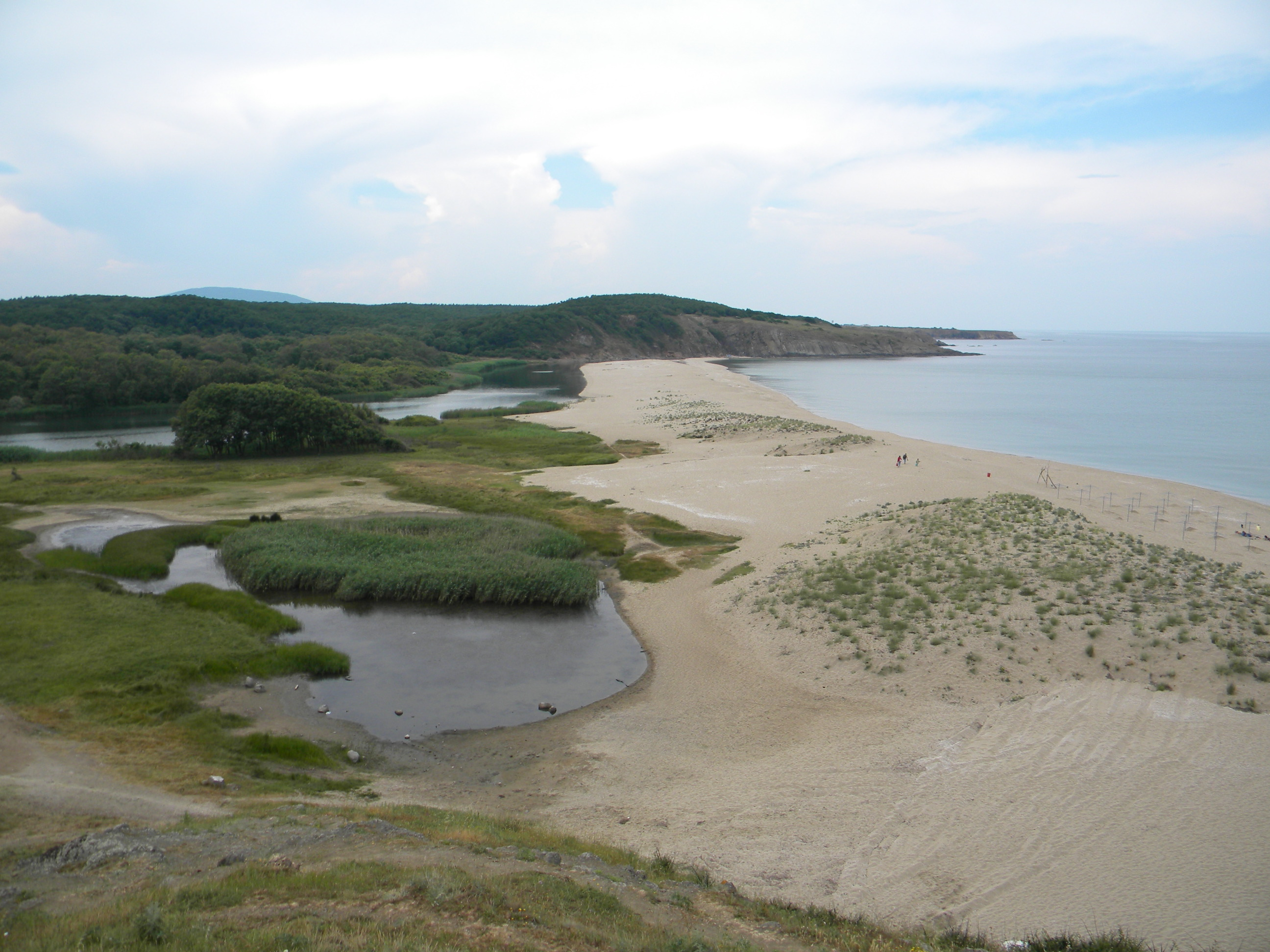 Пясъчната коса при устието на Велека